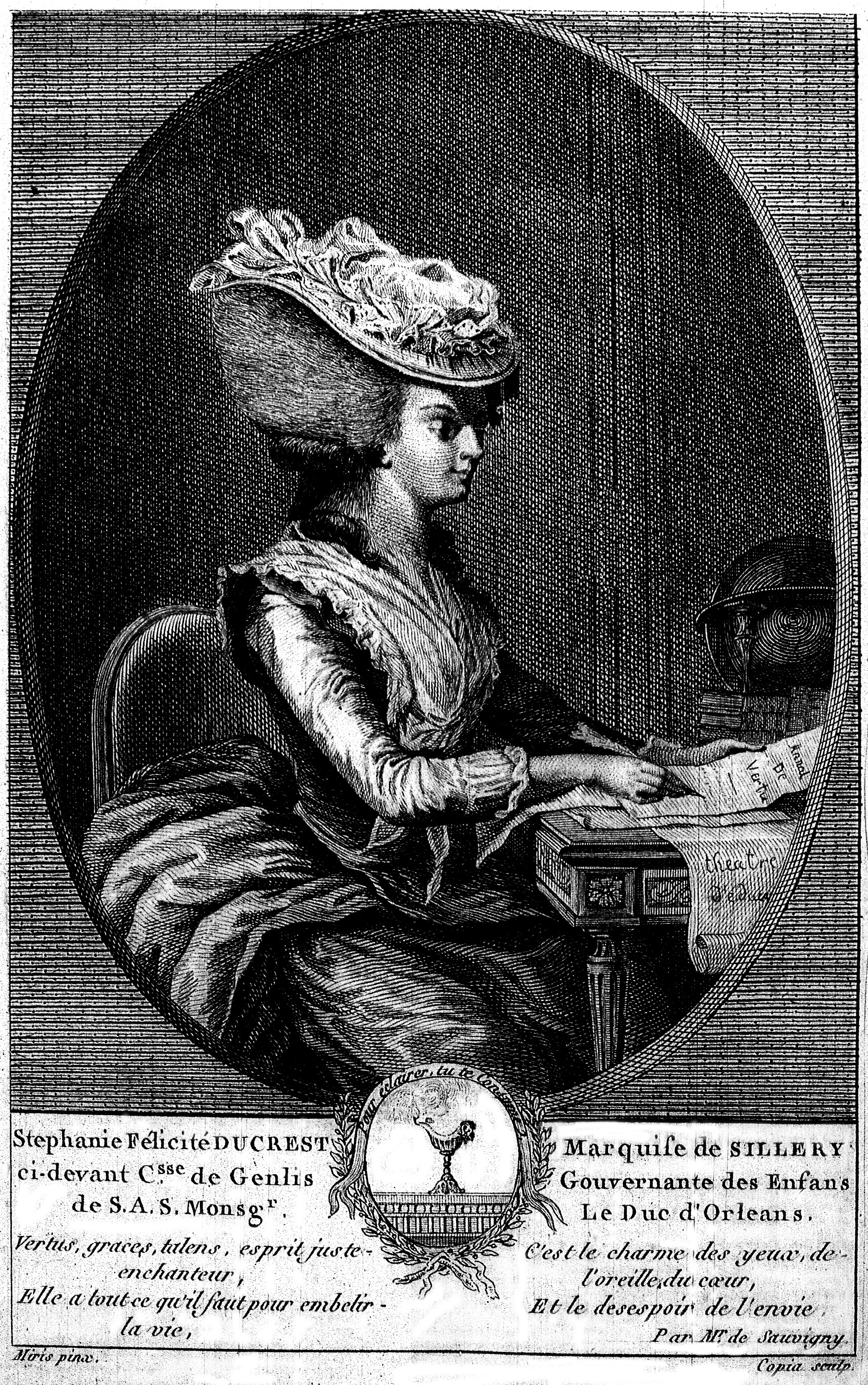 issu du fonds iconographique de Reims.